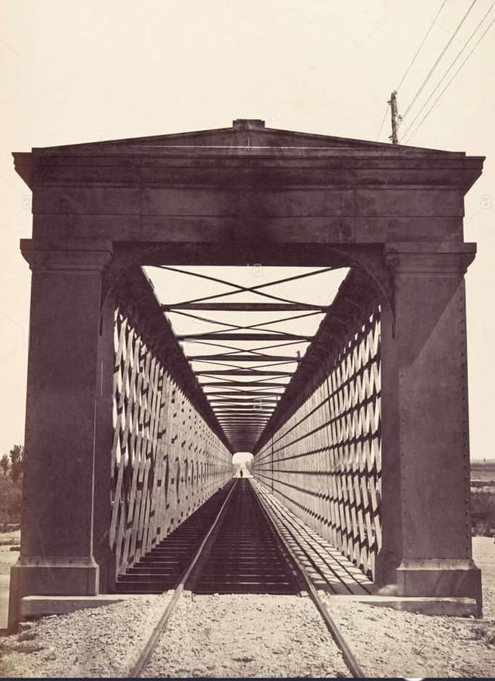 Puente de ferrocarril sobre el Río Gállego en la línea Zaragoza-Barcelona por Lérida. Año 1867. Foto de Jean Laurent